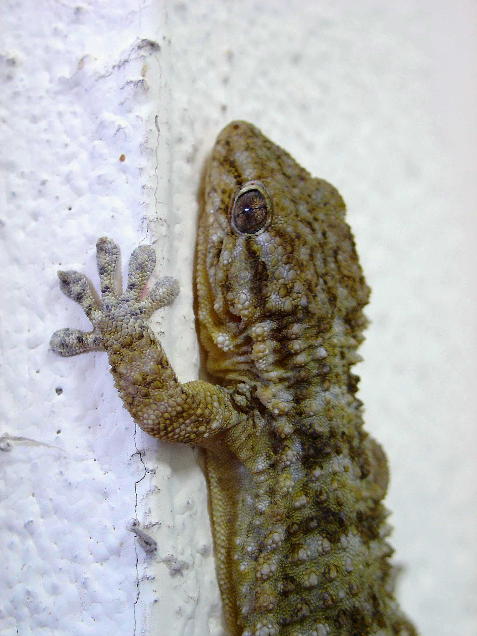 Salamanquesa común (Tarentola mauritanica).